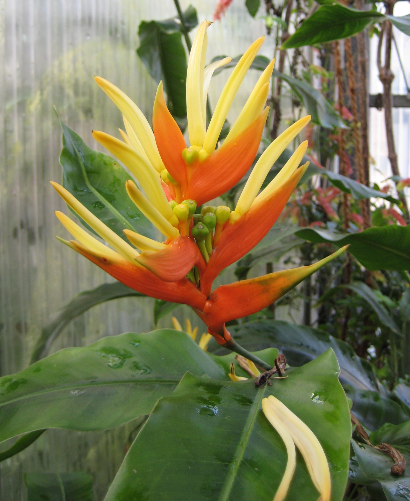 Heliconia aurantiaca im Botanischen Garten Dresden